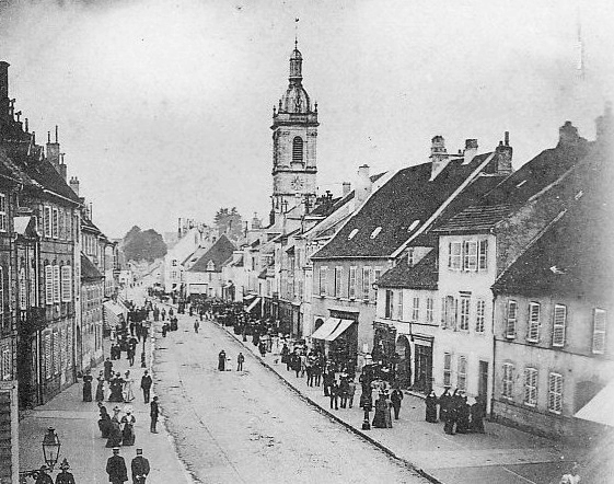 La grande rue de Lure avec l'église.